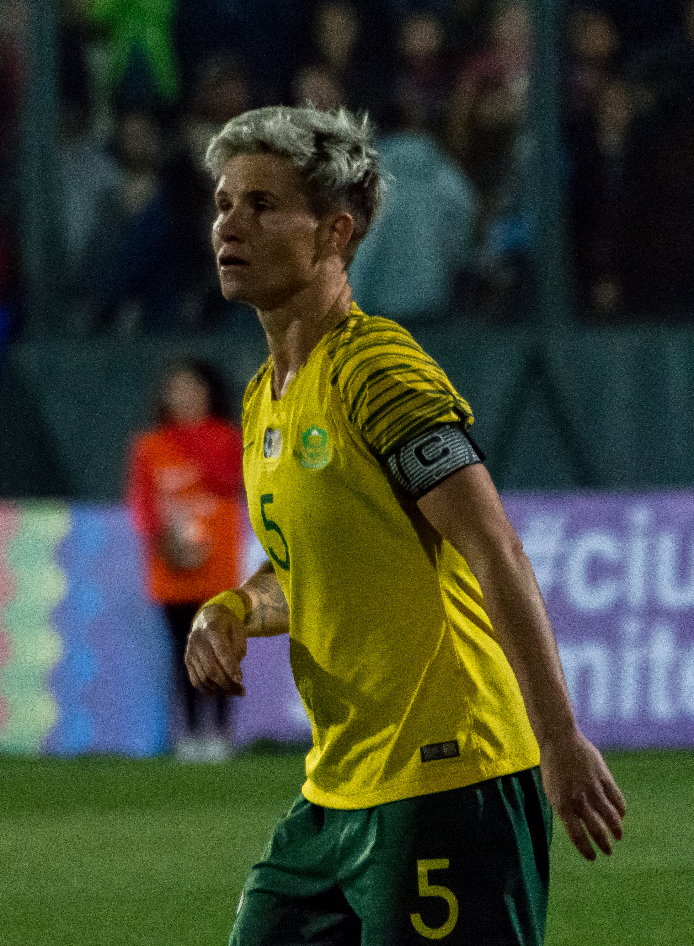 Janine van Wyk, Chile v Sudáfrica, Estadio Santa Laura, Independencia, Santiago, Chile.